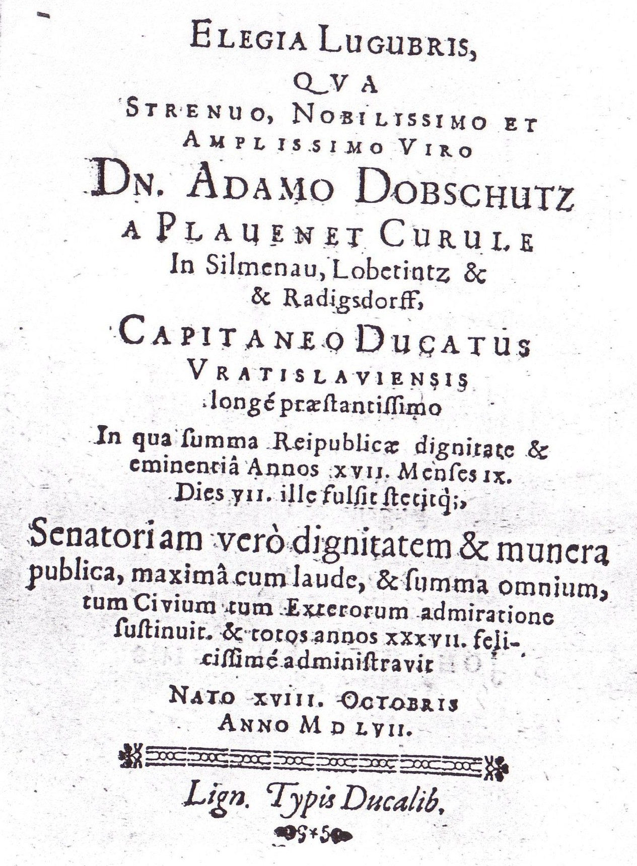 Lateinische Huldigung auf Adam von Dobschütz